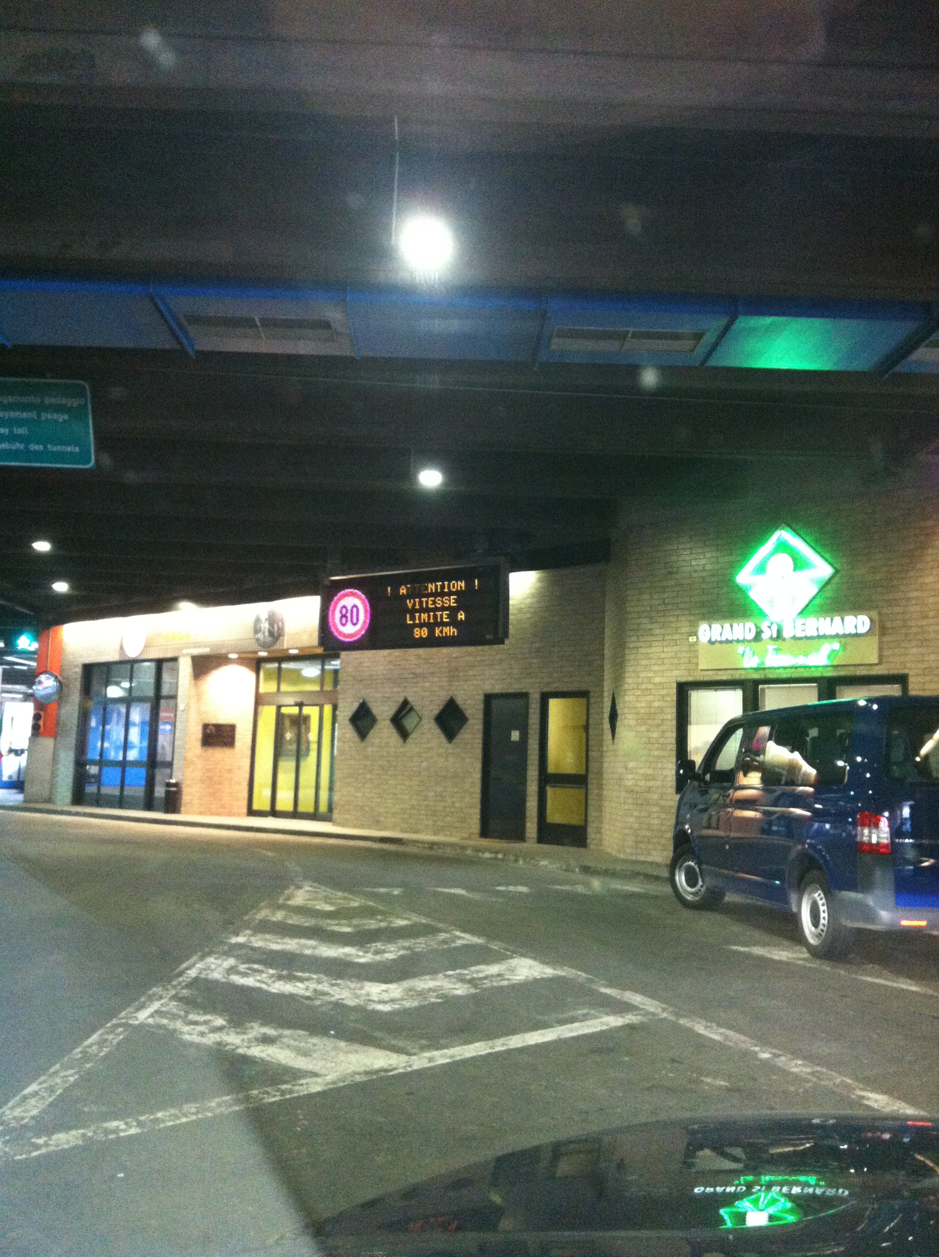 Imbocco italiano del Traforo del Gran San Bernardo, nei pressi della dogana coperta